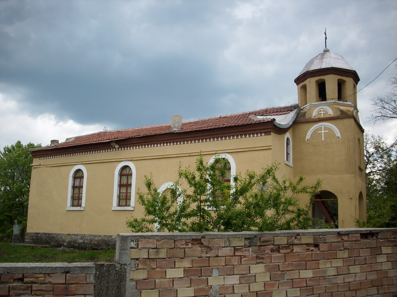 Село Бракница, община Попово - църковният храм